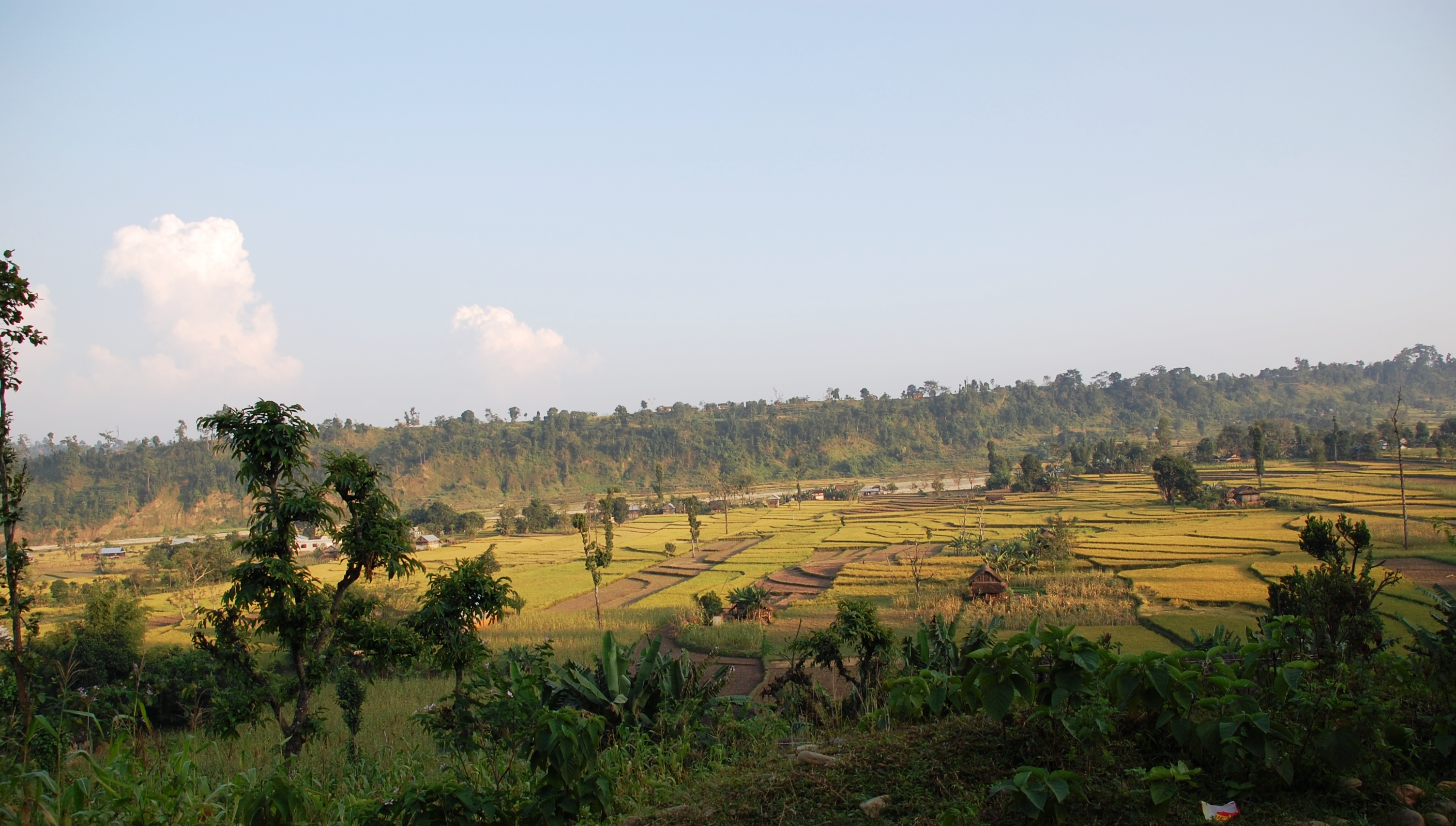 Kavre district, Nepal